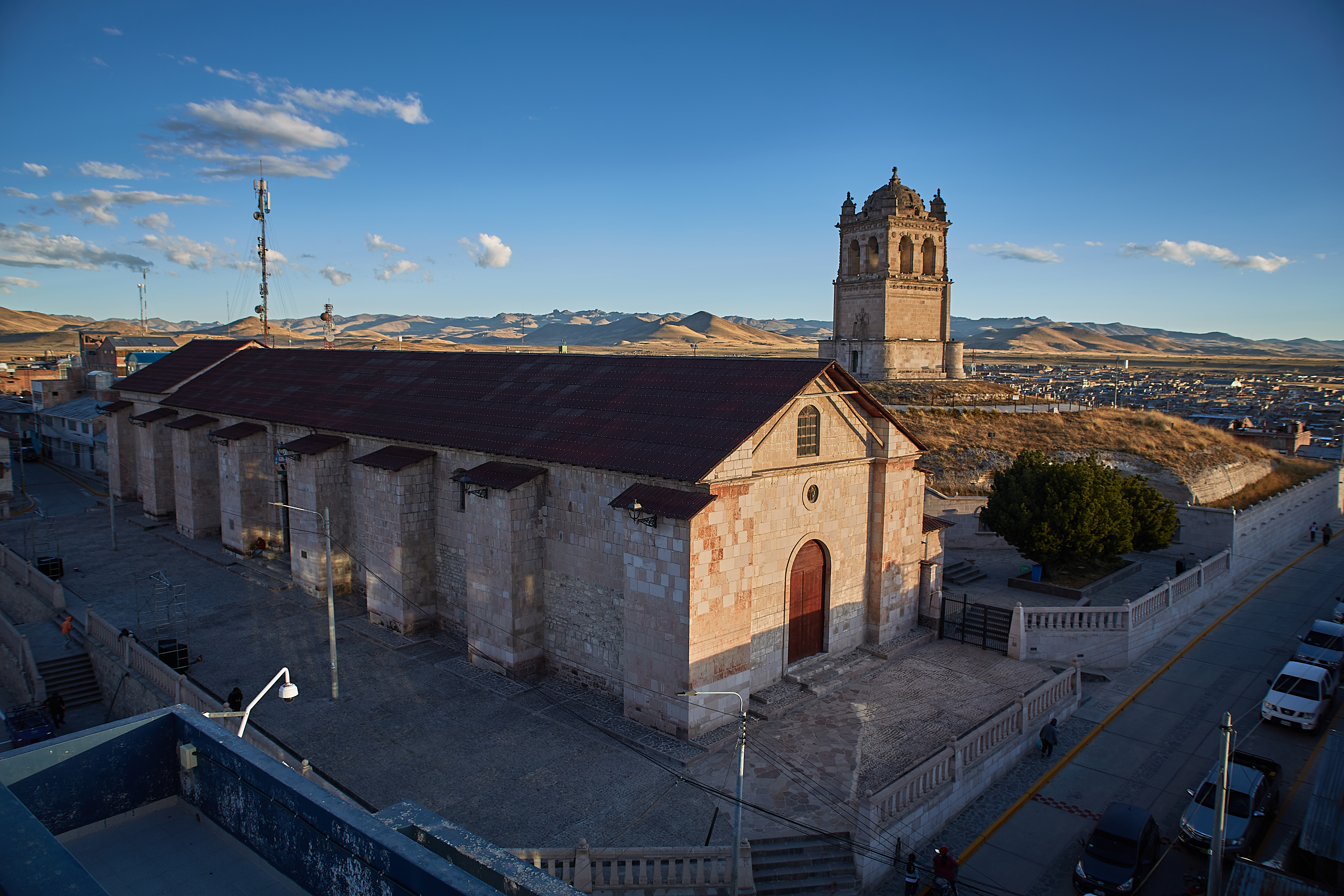 Templo Santa Ana de Yauri, conjunto religioso conformado por templo, y torre exenta